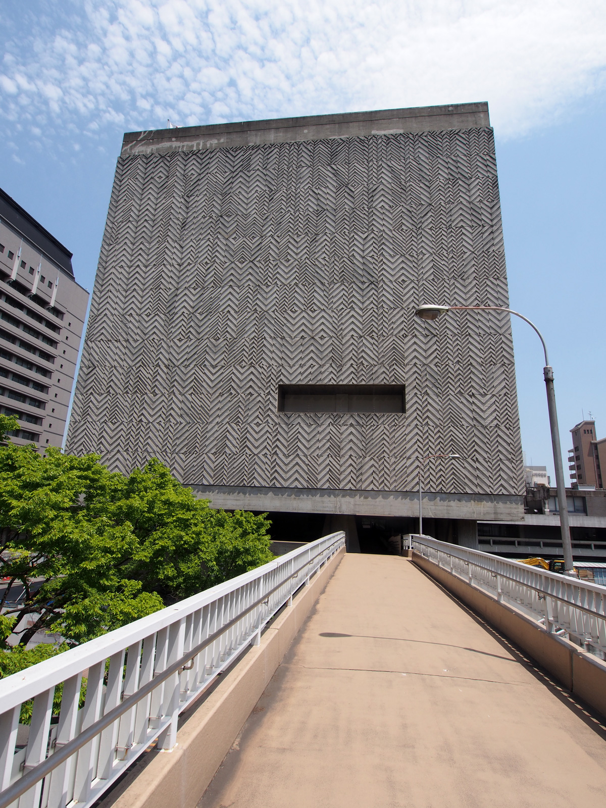 大分県庁舎本館レリーフ（大分県大分市）流政之作